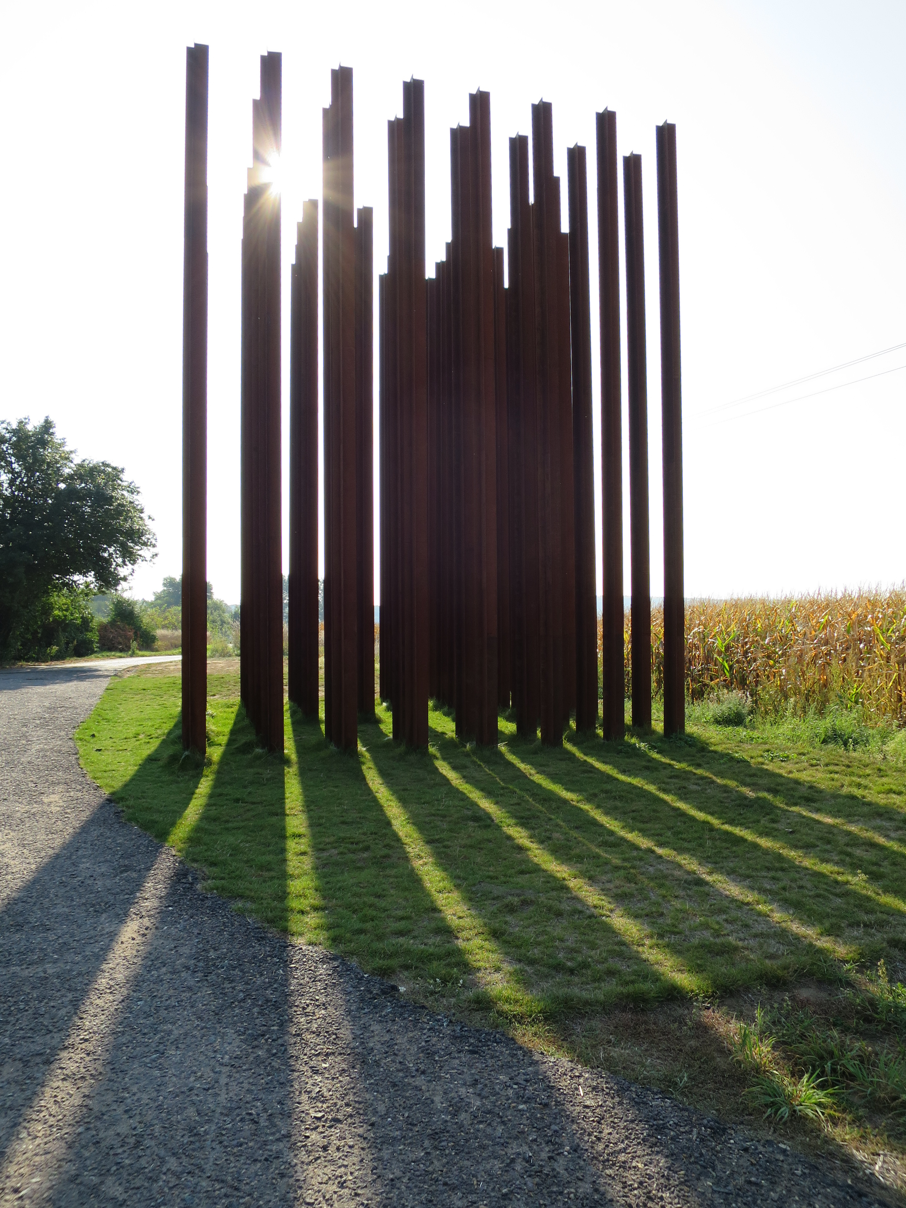 Brána ke svobodě, památník tvoří 53 kovových stél, na kterých jsou jména lidí, kteří v letech 1948–1989 zemřeli při pokusu o překročení hranice. Umístěn u cyklostezky Stezka svobody, která kopíruje zaniklé ploty a ostnaté dráty železné opony.